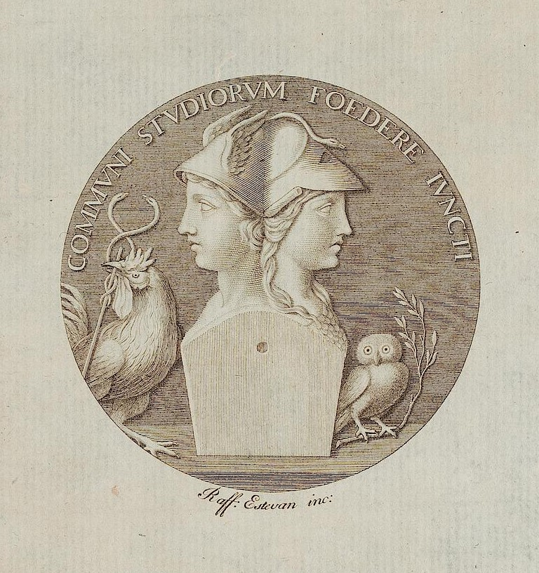 L'Ermatena, Ossia, La Impronta Da Darsi Al Gettone Della Regal Società : Memorie della Regale Accademia Ercolanese di Archeologia.